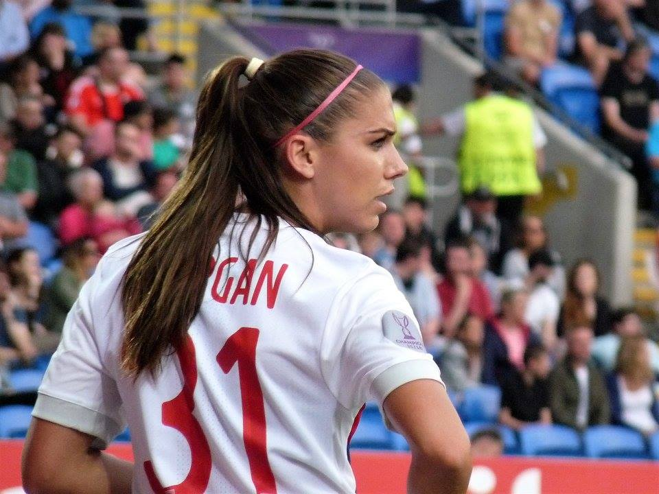 Alex Morgan lors de la finale de la Ligue des champions 2016-2017 à Cardiff.